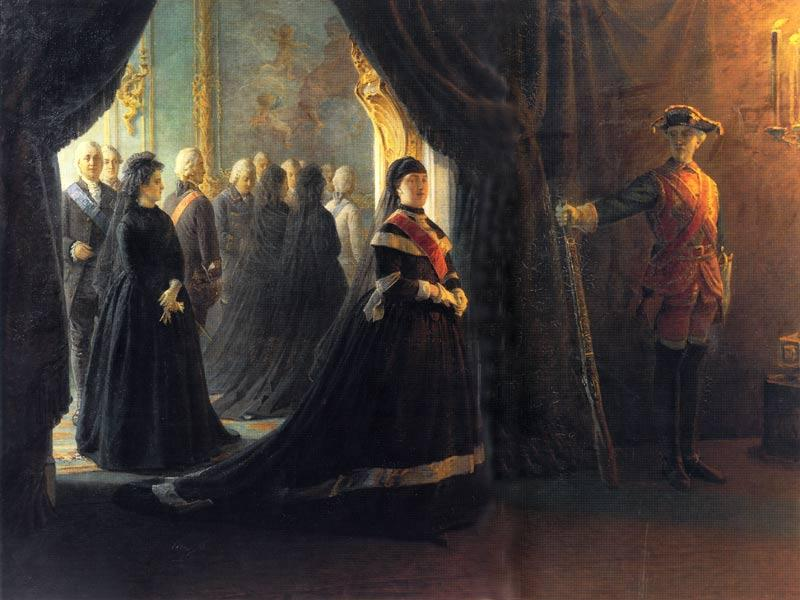 Ге Н.Н. Екатерина II у гроба императрицы Елизаветы. 1874. ГТГ